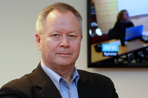 Kåre Simensen